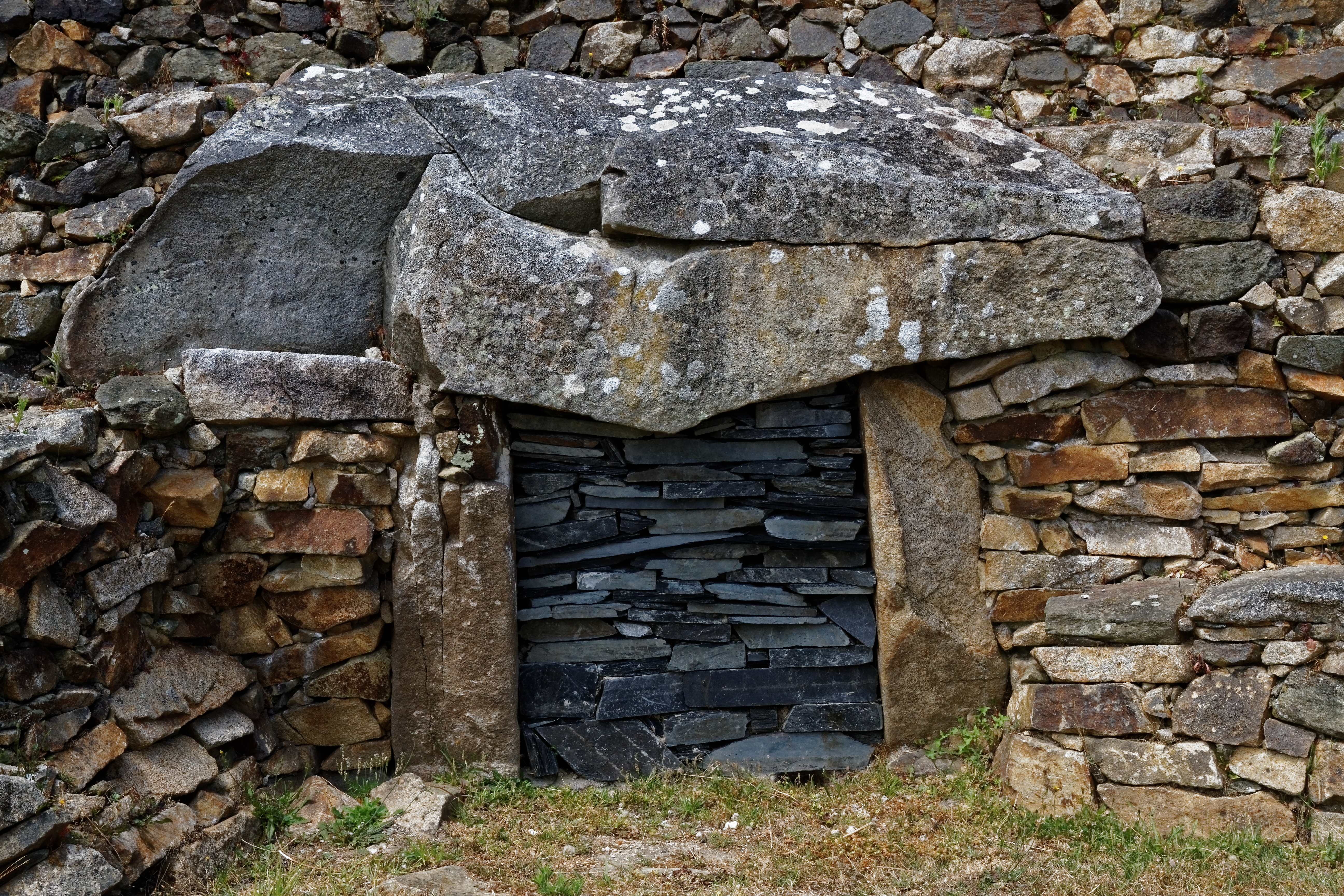 Panorama du Cairn de Barnenez à Plouezoc'h dans le Finistère. .